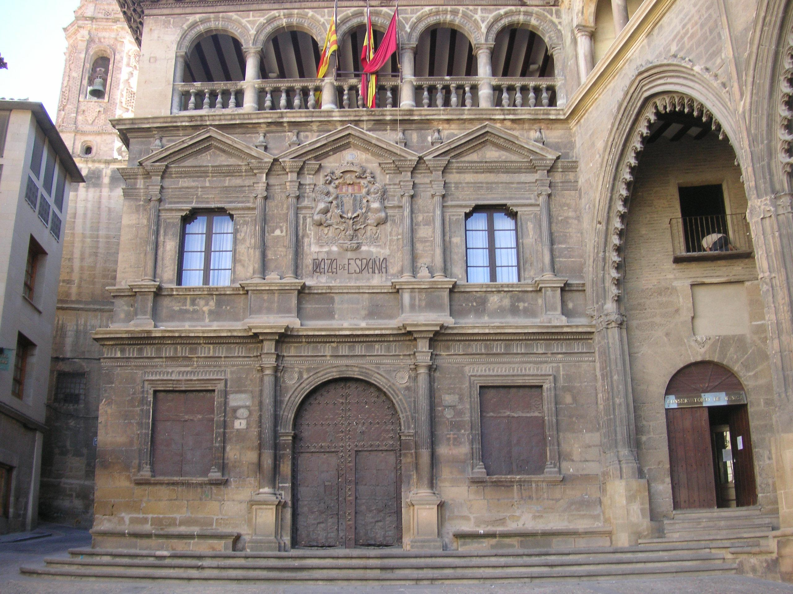 Vista frontal del Ayuntamiento de Alcañiz - Teruel